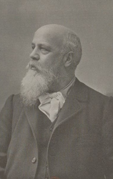 Portrait d'Angelo Mariani pour l'annuaire 1900 de La Marmite